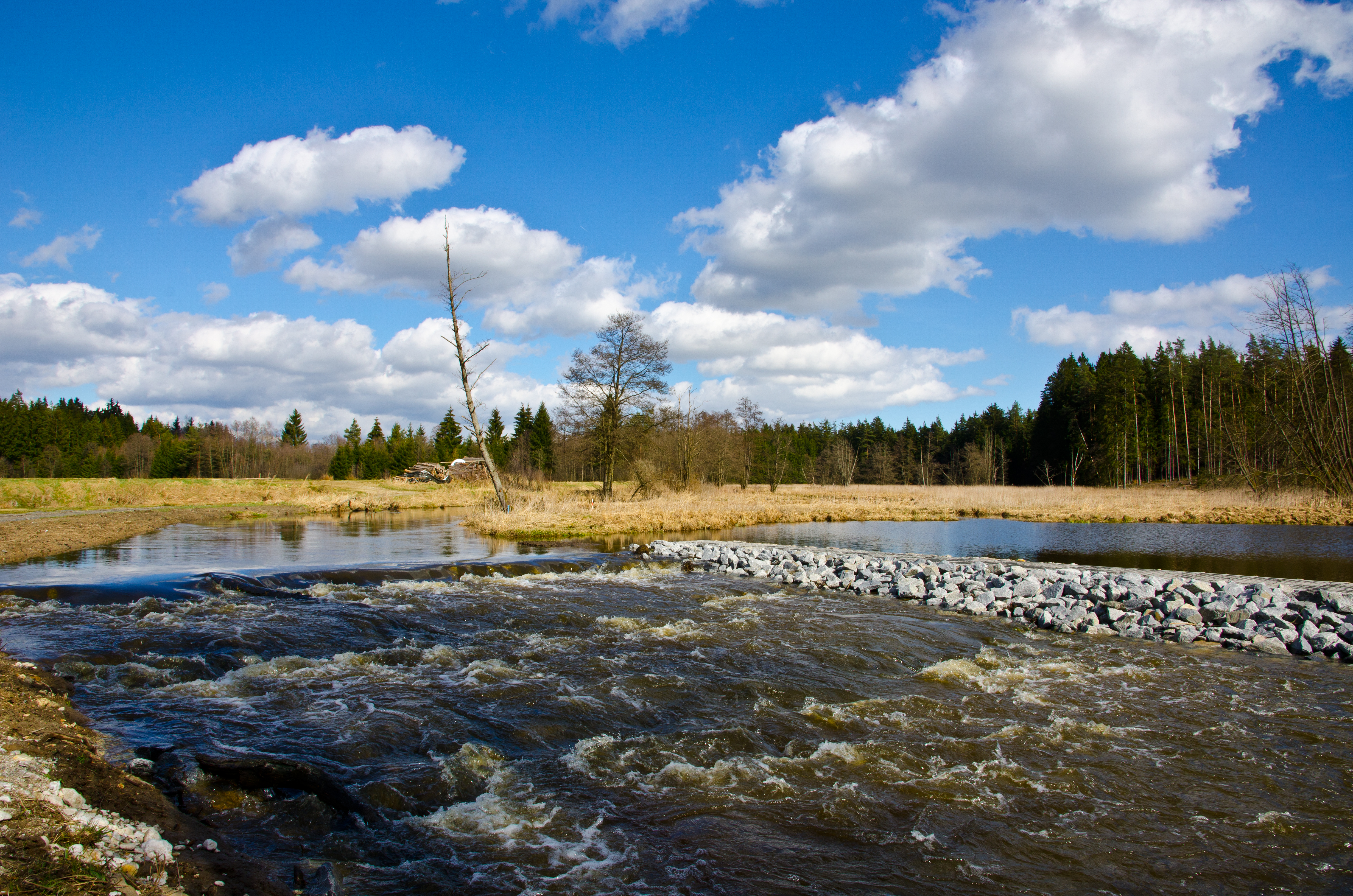 Fischtreppe in der Waldnaabaue bei Gumpen FFH-Gebiet (Flora-Fauna-Habitat-Gebiet)